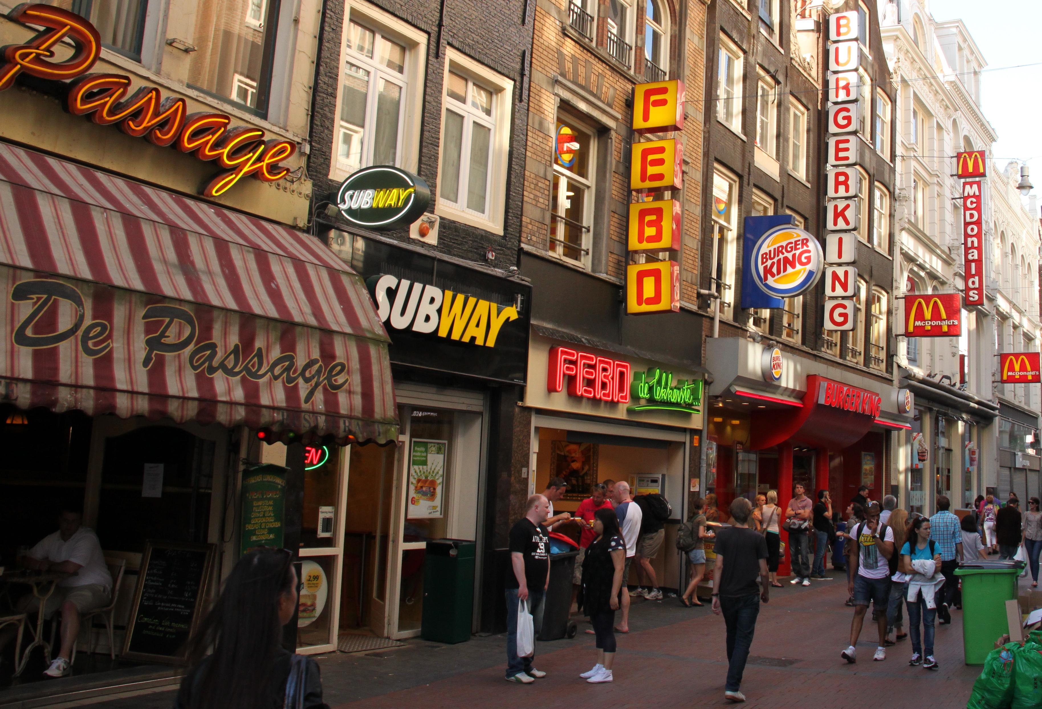 Verschillende fastfood-bedrijven naast elkaar in Amsterdam.